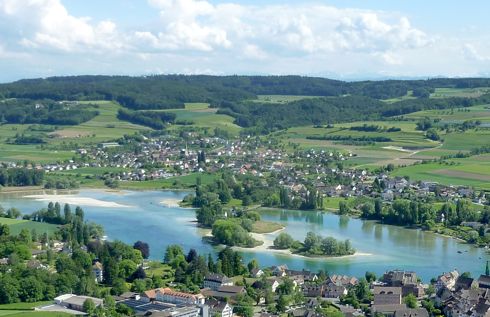 Eschenz